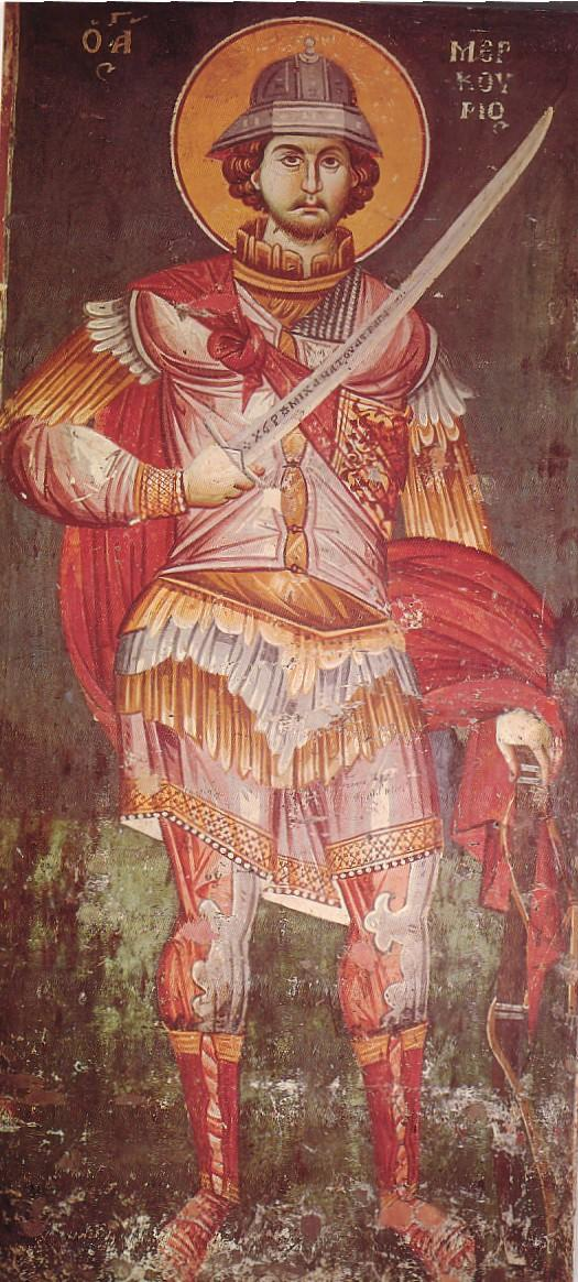 Byzantine fresco with Saint Mercurius. Фреска с византийским св. Меркурием. Охрид, Македония